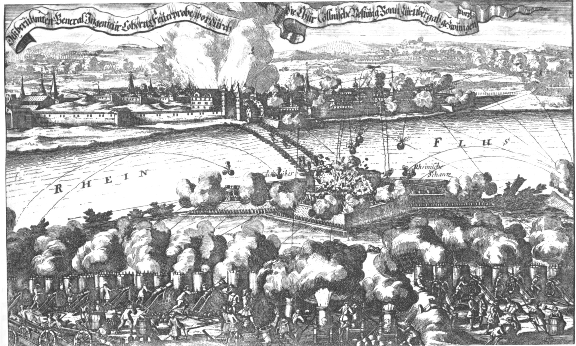 Darstellung der Belagerung der Stadt Bonn im Jahre 1703. Im Vordergrund der Beschuss der Beueler Schanze von den Belagerungstruppen.